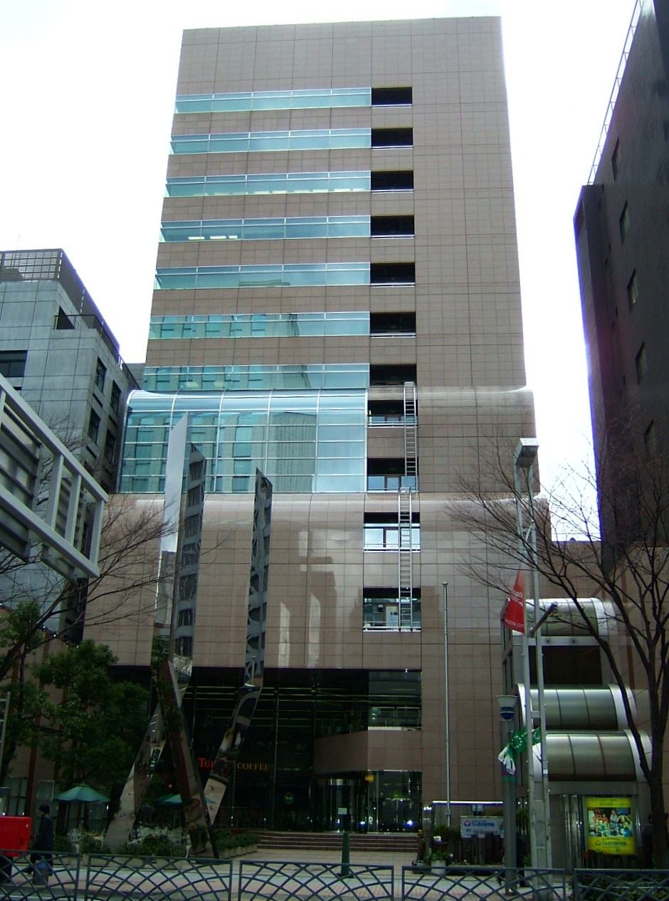 中部電力の電気の科学館（建物は電気文化会館）